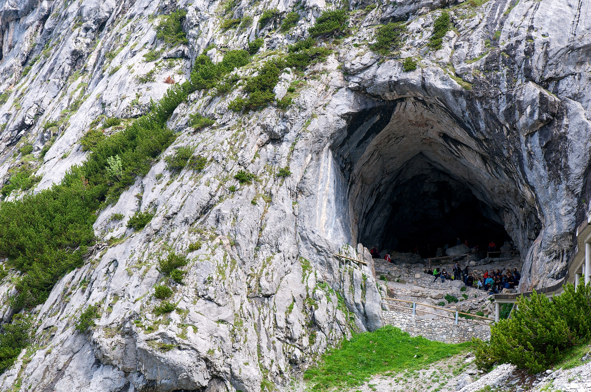 Blick auf den Eingang der Eisriesenwelt, Salzburger Land, Österreich